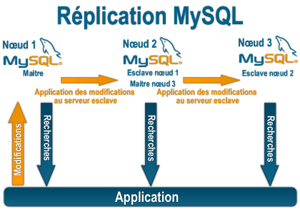 Schéma de représentation du fonctionnent de la replication sous MySQL d'après le manuel